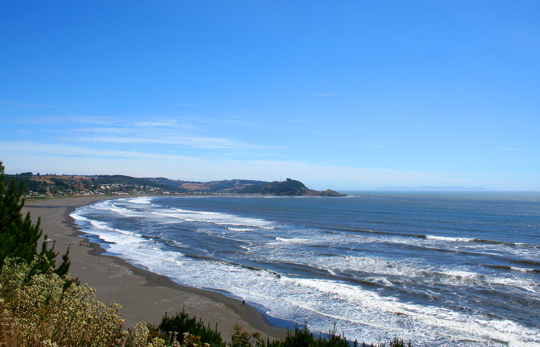 Fotografía tomada desde la Punta Cura a la playa de Quidico.